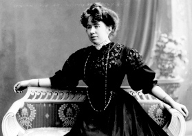 D'Helen Buchholtz. Foto vum Charles Bernhoeft